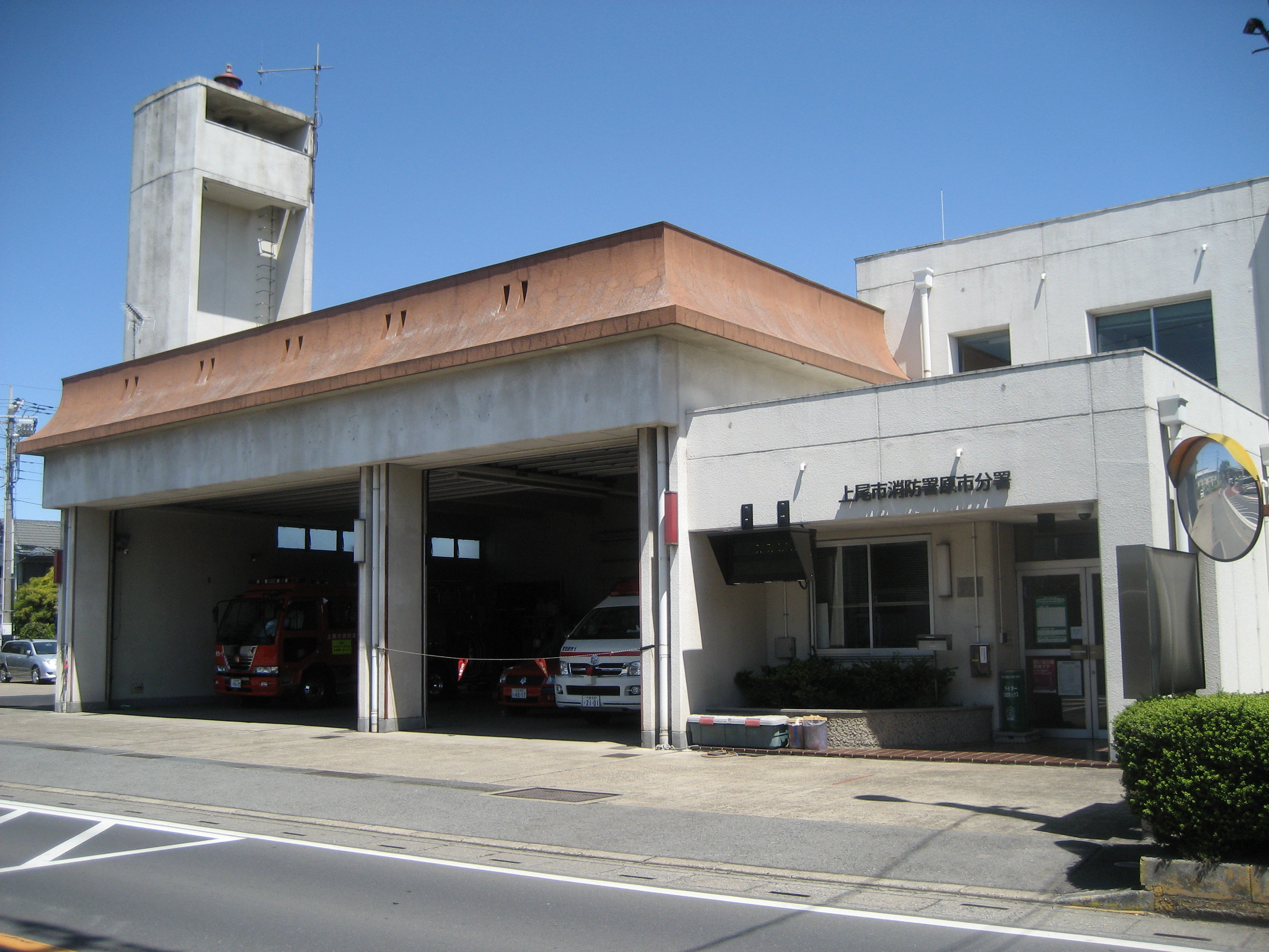 上尾市消防本部東消防署原市分署（建物東側を撮影）